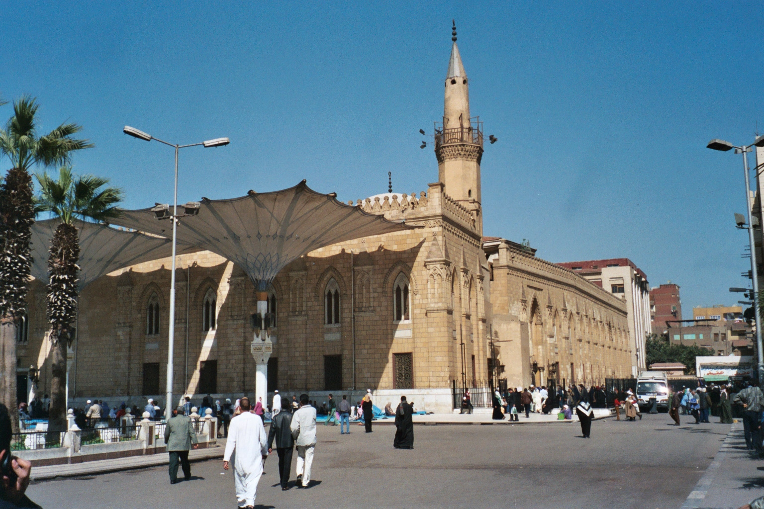 Mosquée al-Husayn au Caire